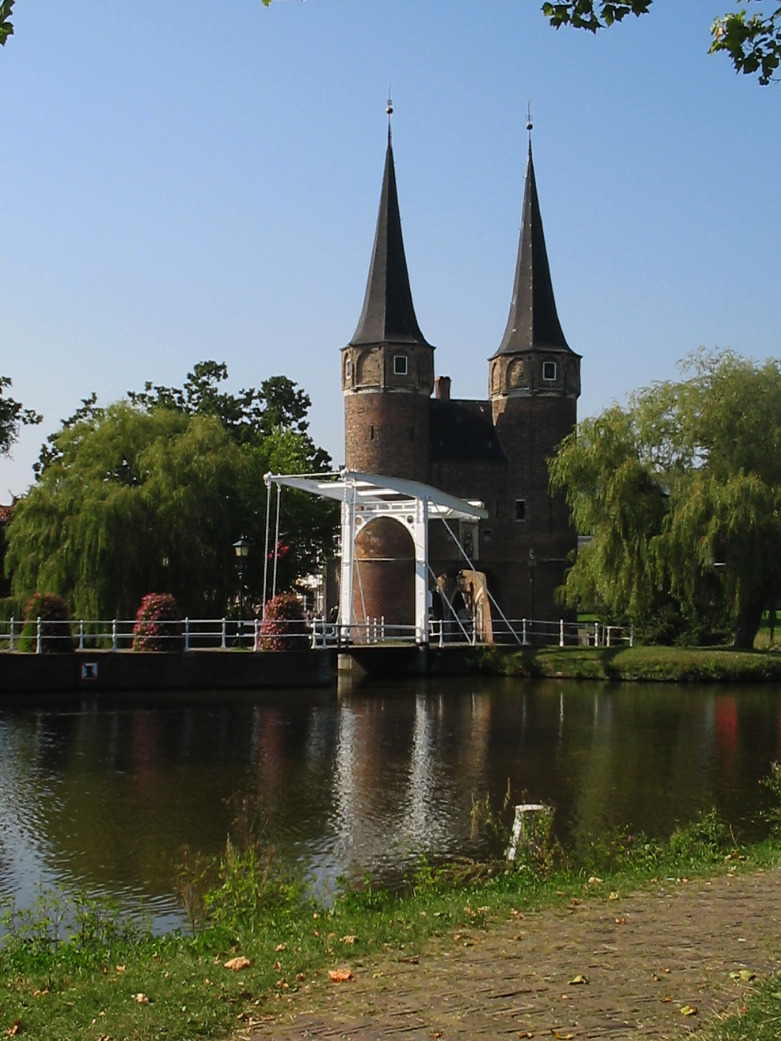 Oostpoort, Delft. Sept. 2005